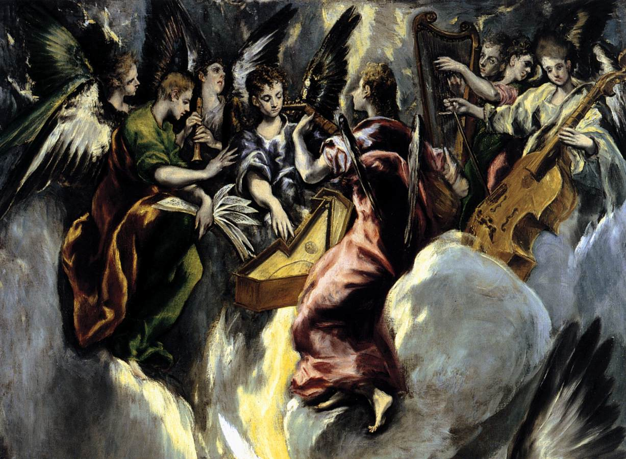 La obra representa el momento en que el Arcángel San Gabriel anunció a la Virgen María que sería la madre de Jesucristo, el Mesías.